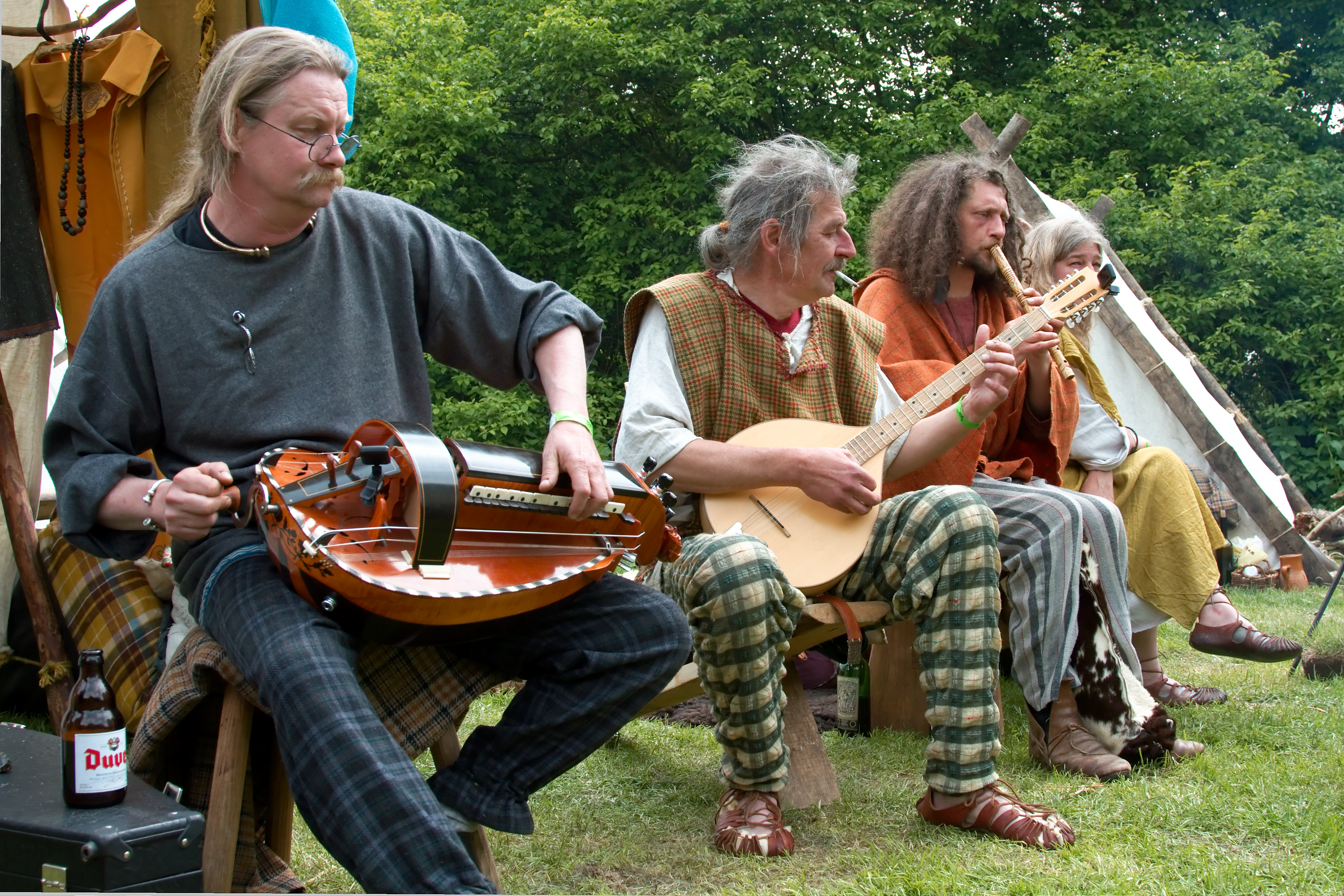 Keltfest 2010